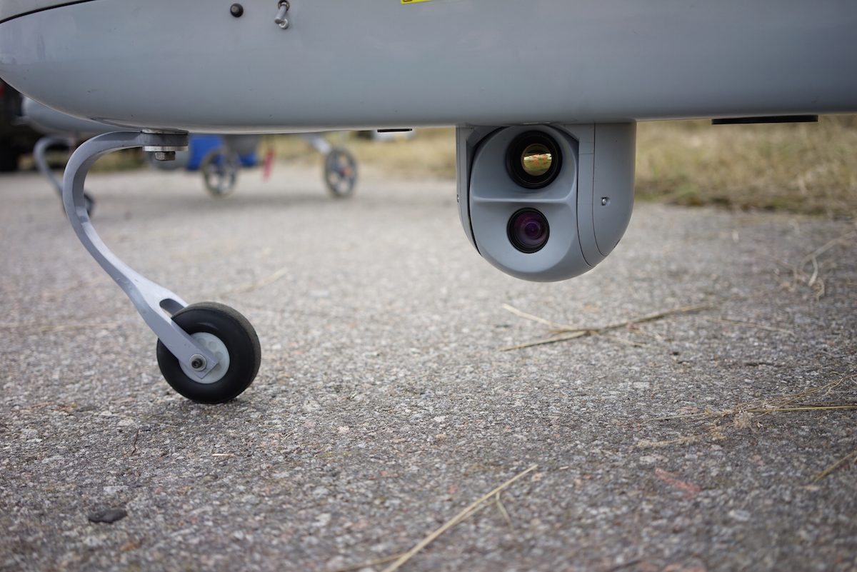 People's Drone PD-1 gimbal